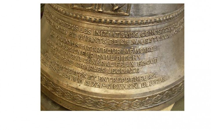 Basilica - Campana dedicata agli architetti e all'impresa